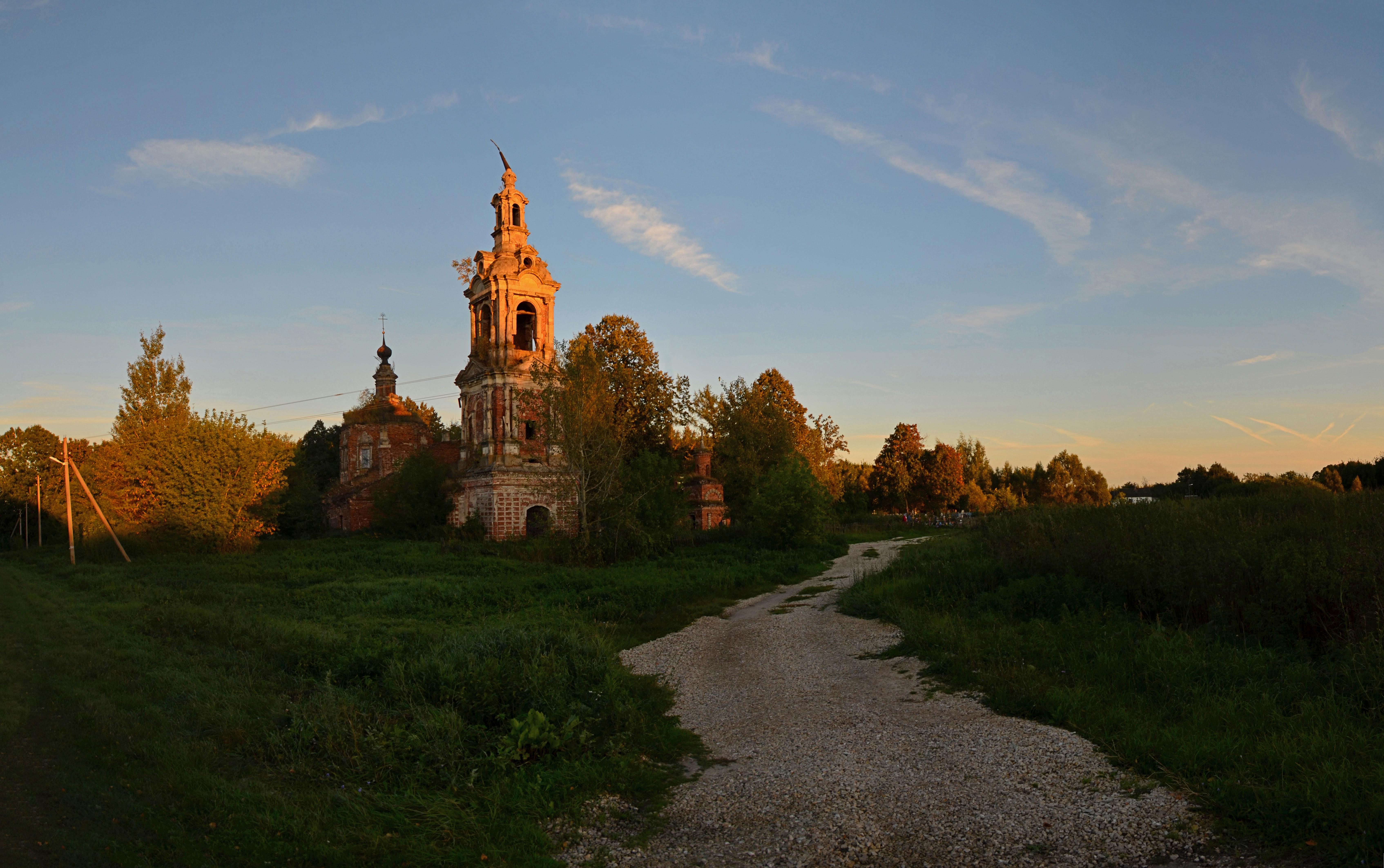 Константиновская церковь: Большое Село, Пронский район, Рязанская область.